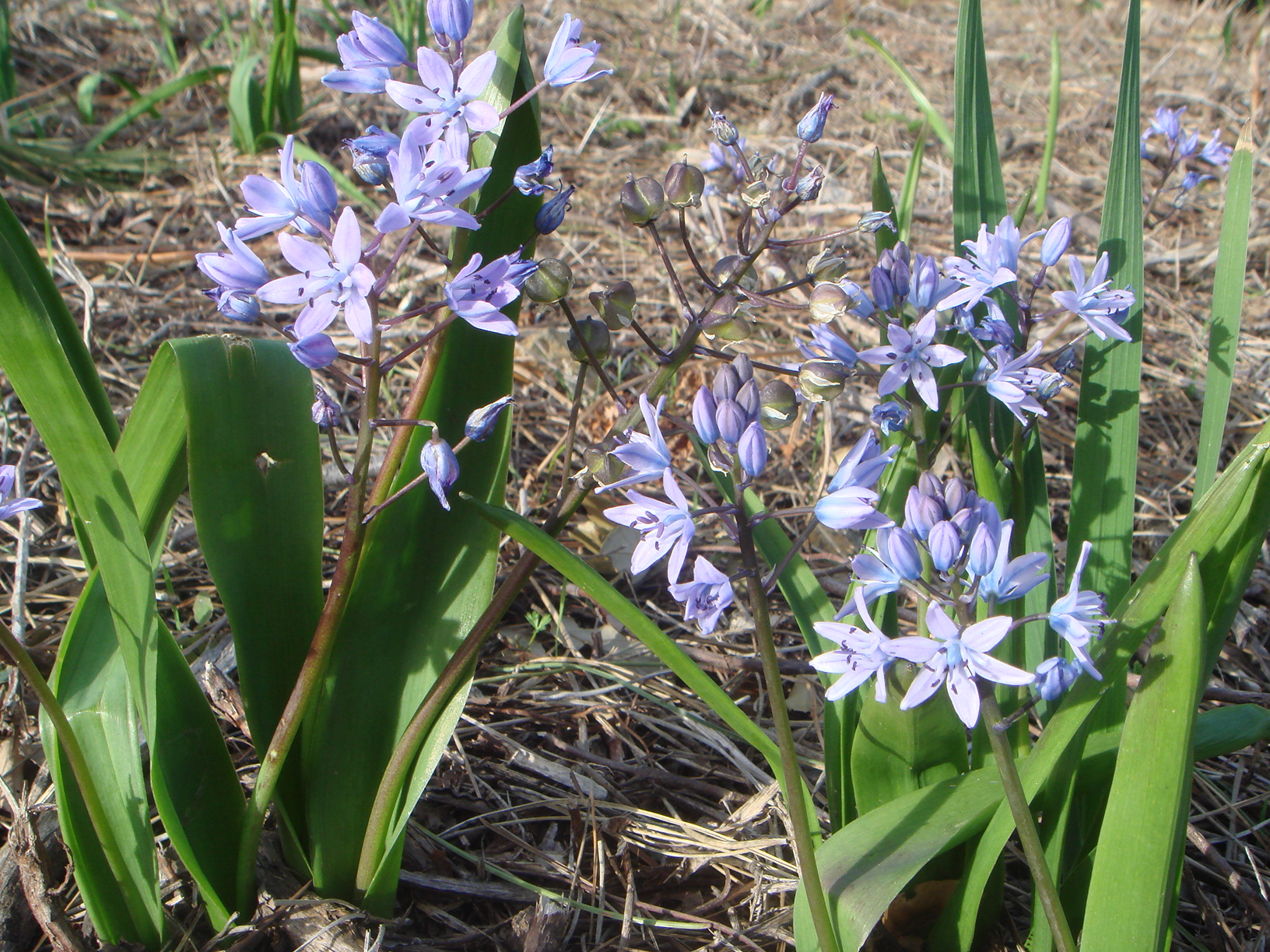 Scilla monophyllos, Ceuta, España